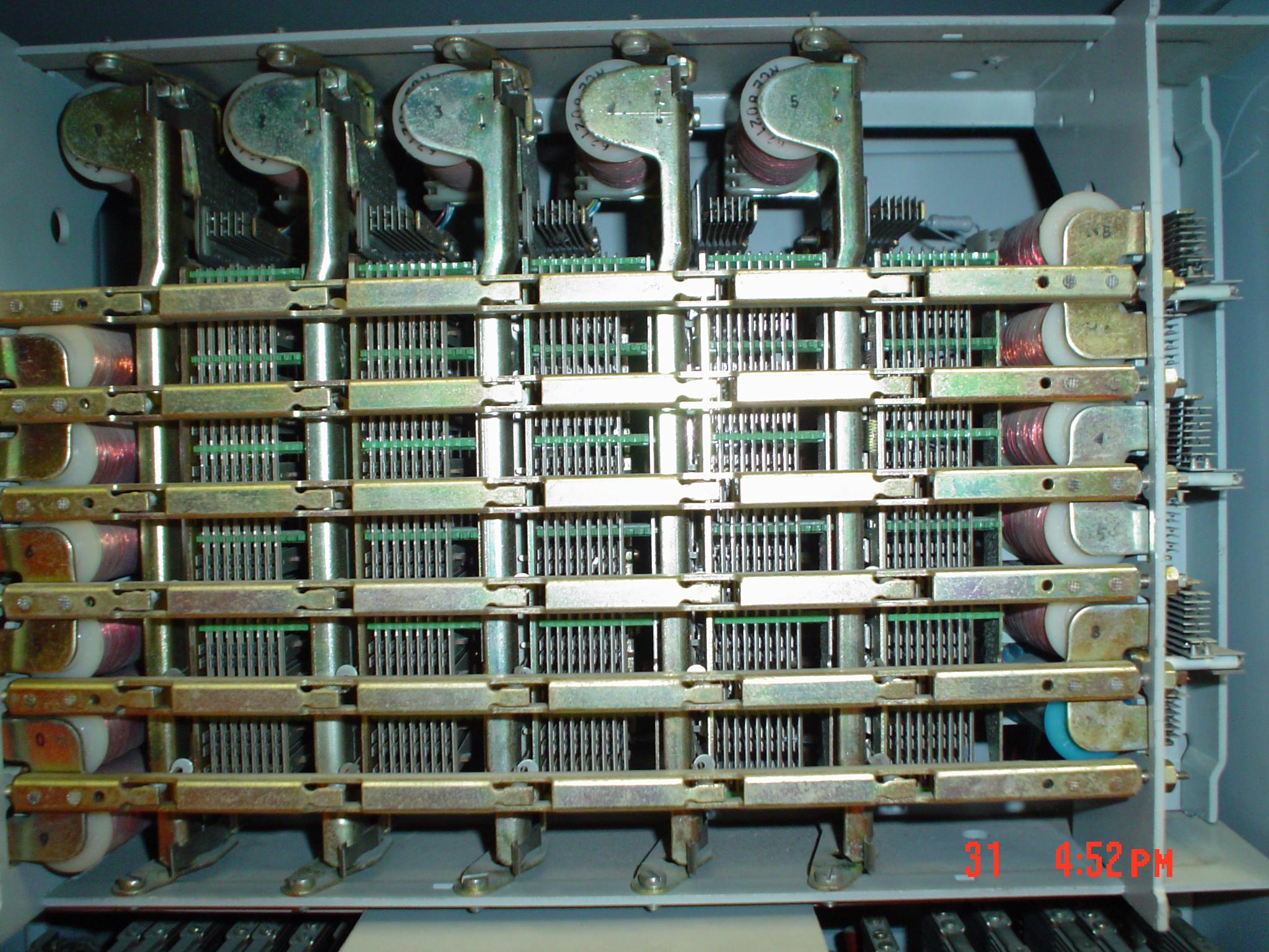 Koordinata_maŝino. Tio estas relajsaj kontaktiloj en koordinata sistemo.